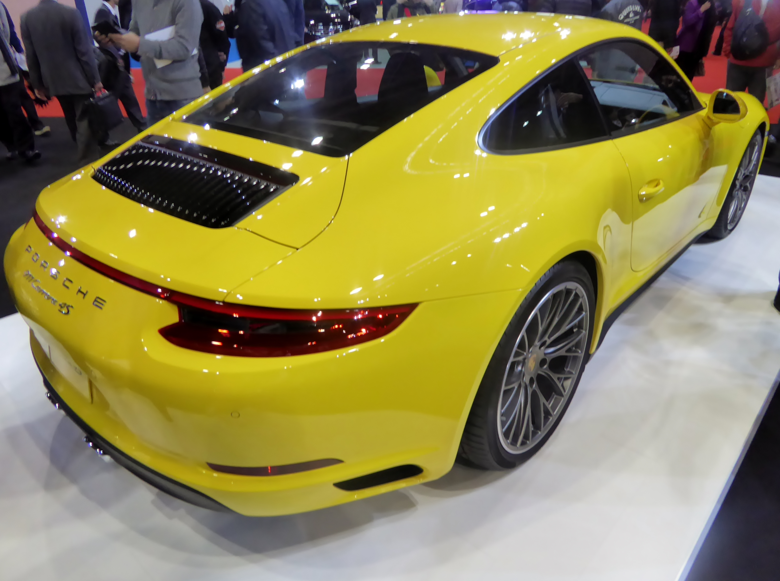 大阪モーターショー2015において991型ポルシェ・911カレラ4Sを撮影。